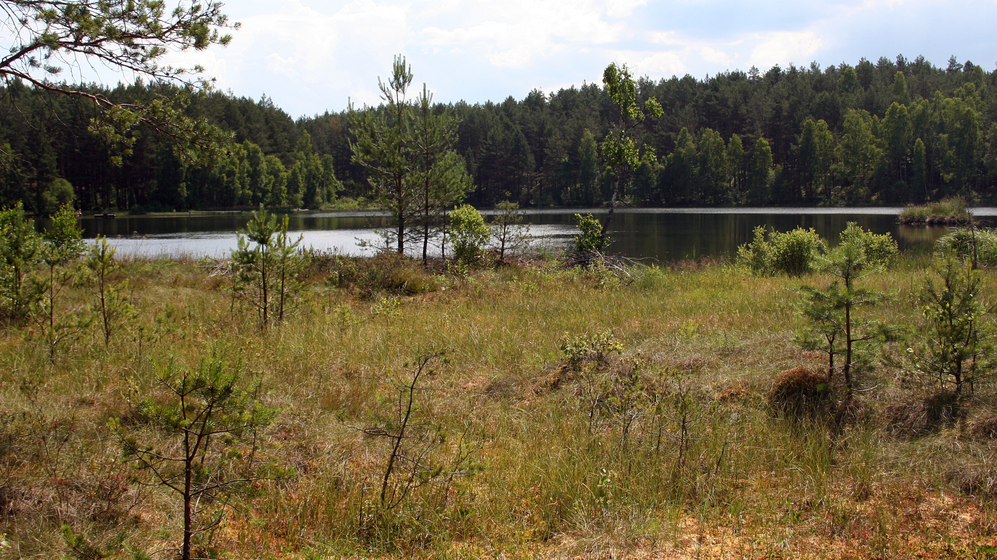 Wdzydzki Park Krajobrazowy, Jezioro Wałachy